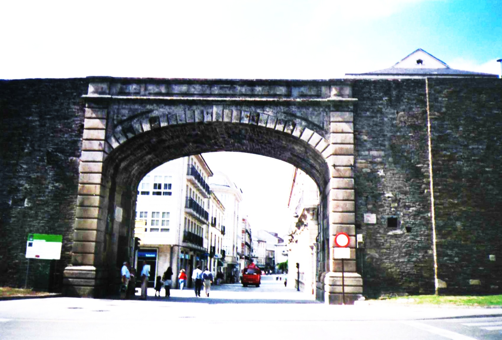 Muralla Romana Lugo